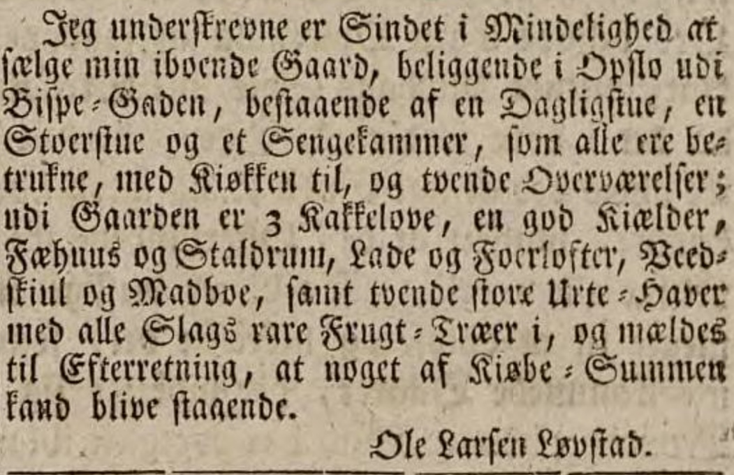 Bispegata i Oslo i boligsalgsannonse fra 1769